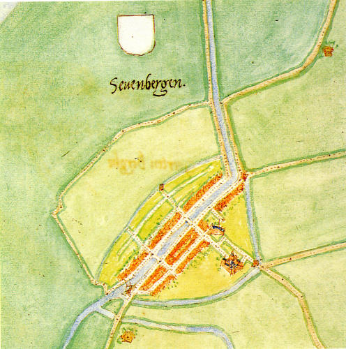 stadskaart Zevenbergen c.a. 1560 Jacobus van Deventer kaart 110